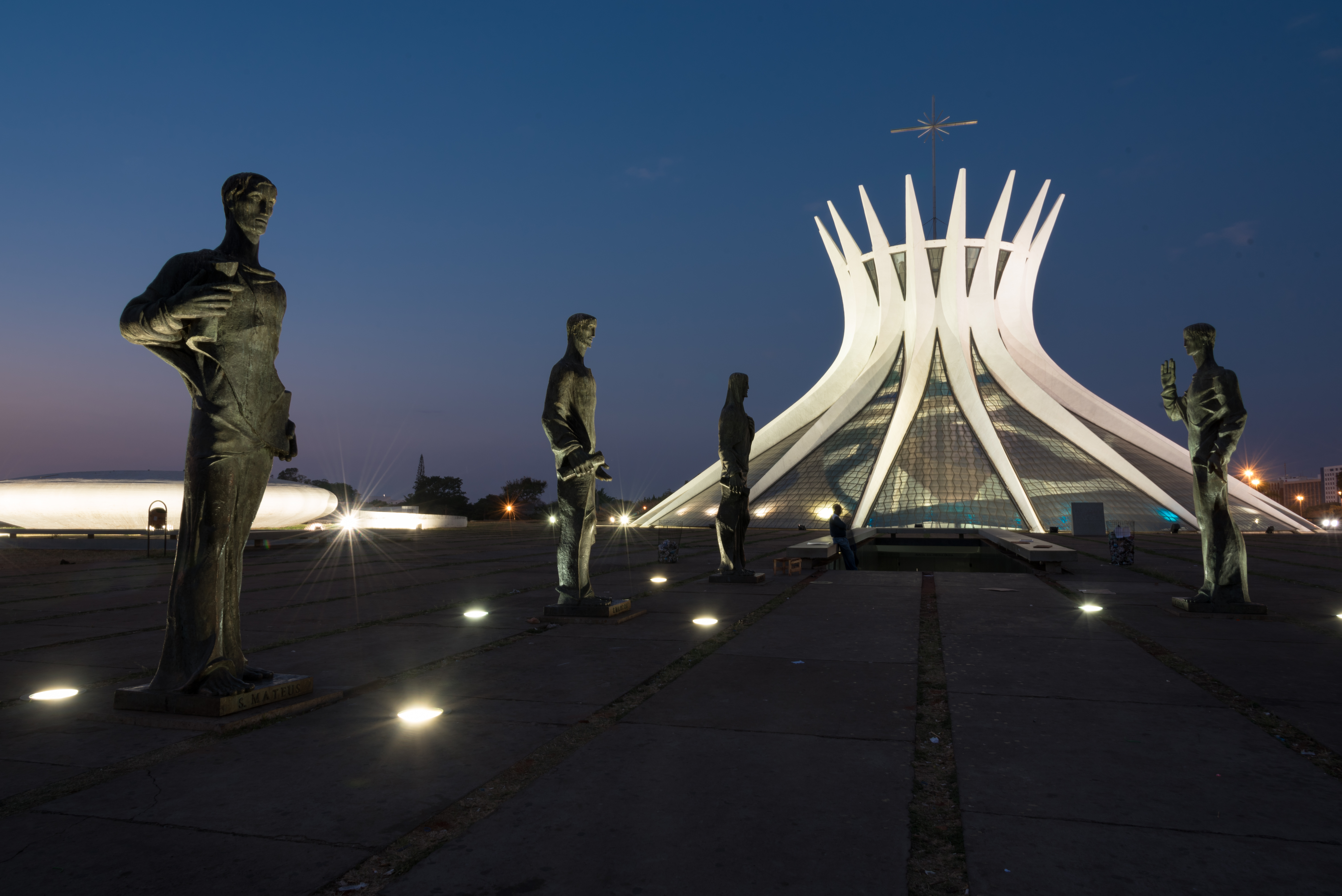 Catedral Metropolitana at dawn.